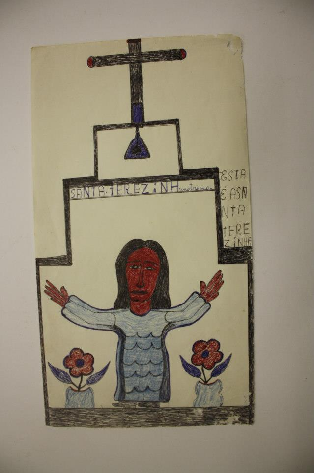 Desenho regionalista capixaba.